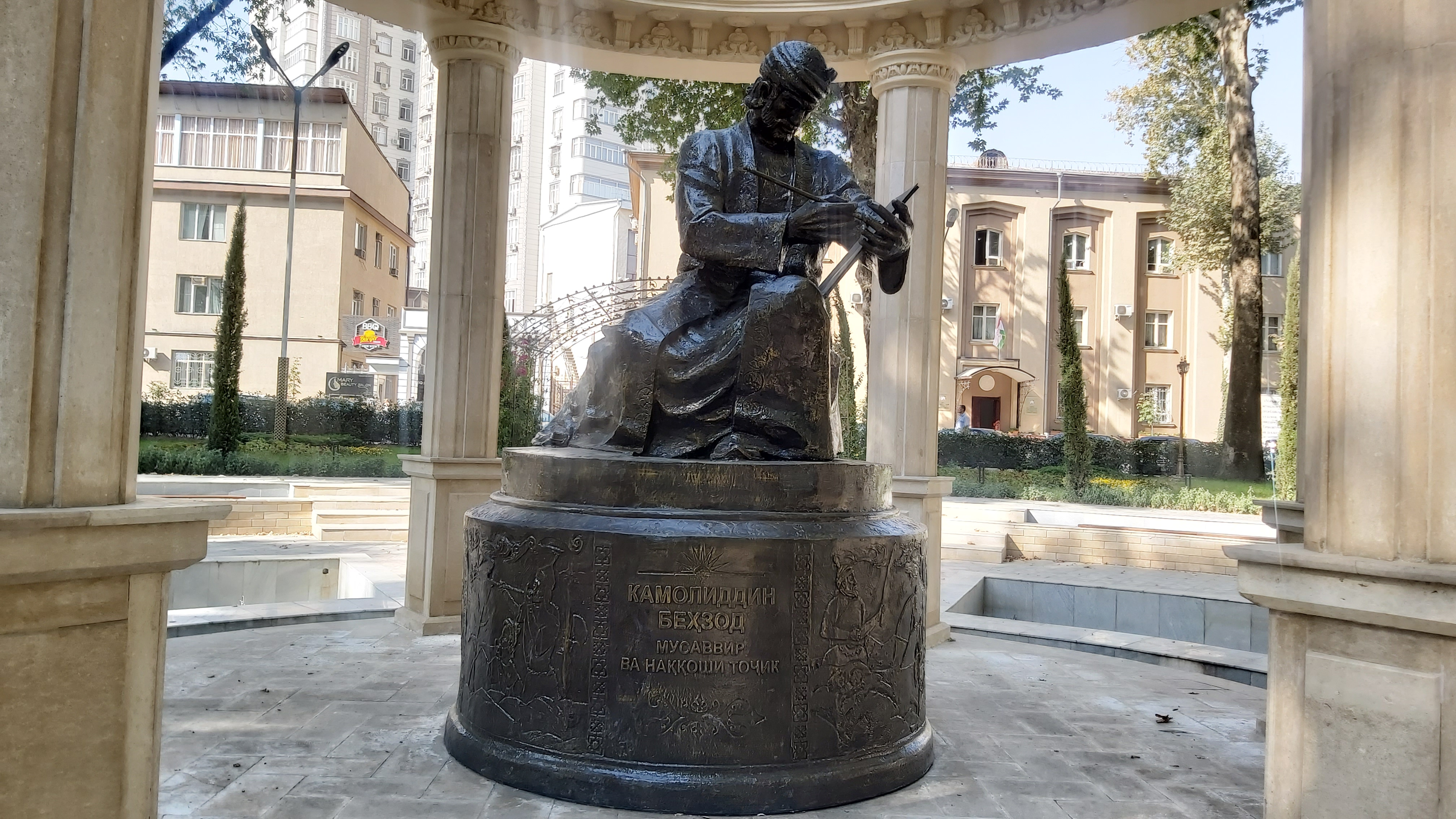 Памятник Бехзоду